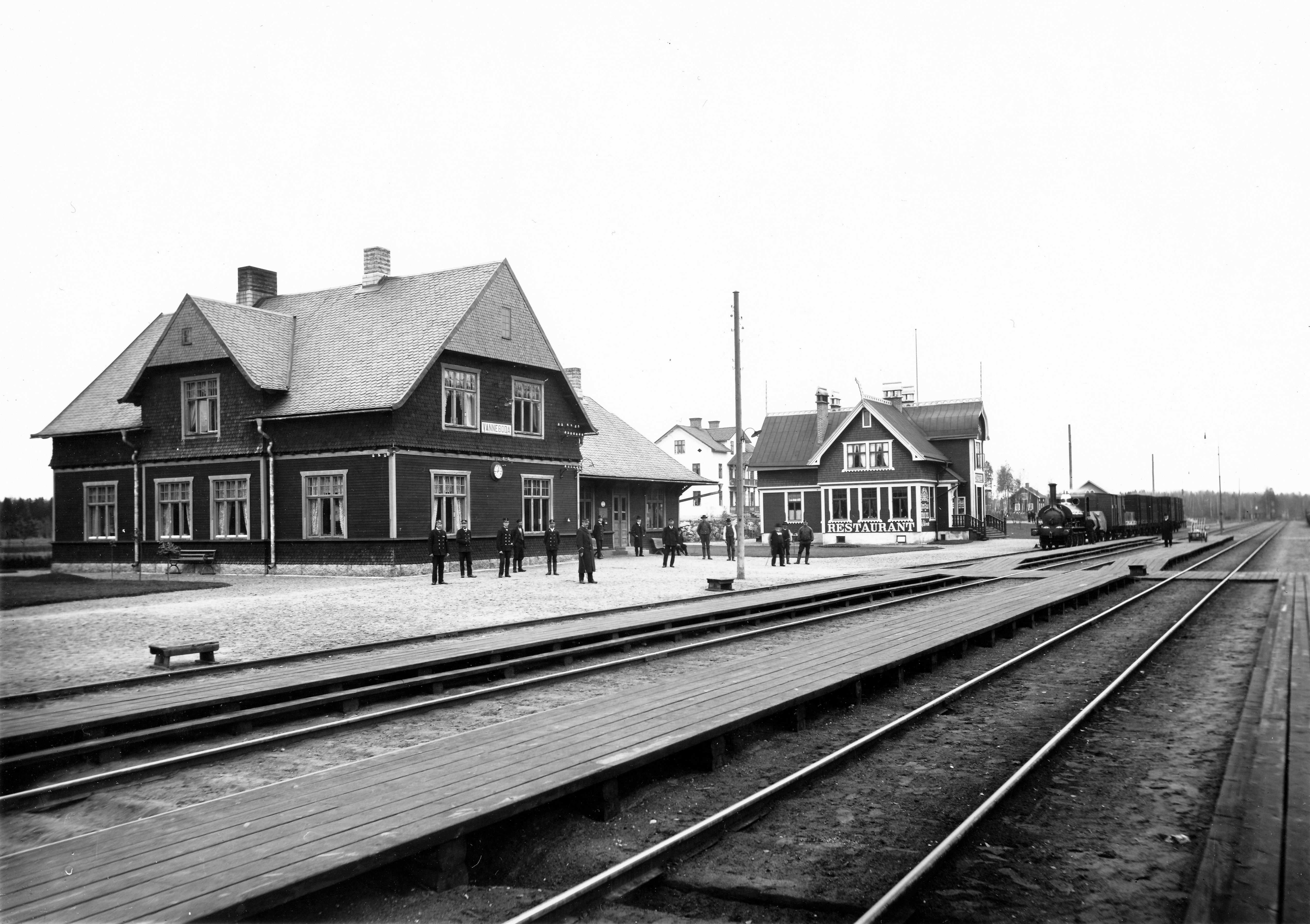 Vanneboda station och hotell vid Örebro-Köpings Järnväg, sedermera TGOJ.